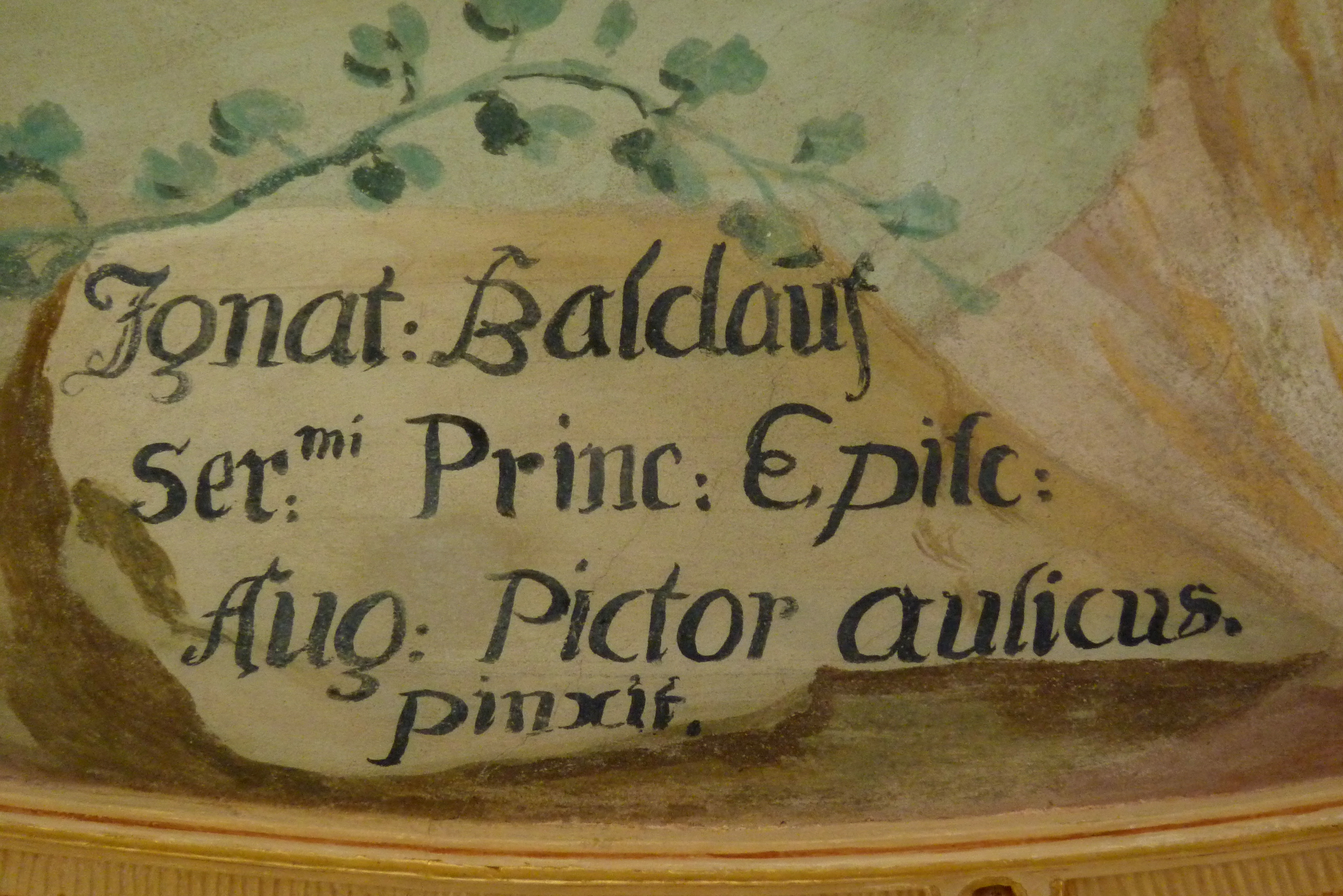 katholische Pfarrkirche St. Stephan in Altenbaindt, einem Ortsteil von Holzheim im Landkreis Dillingen an der Donau , Fresko von Ignaz Baldauf